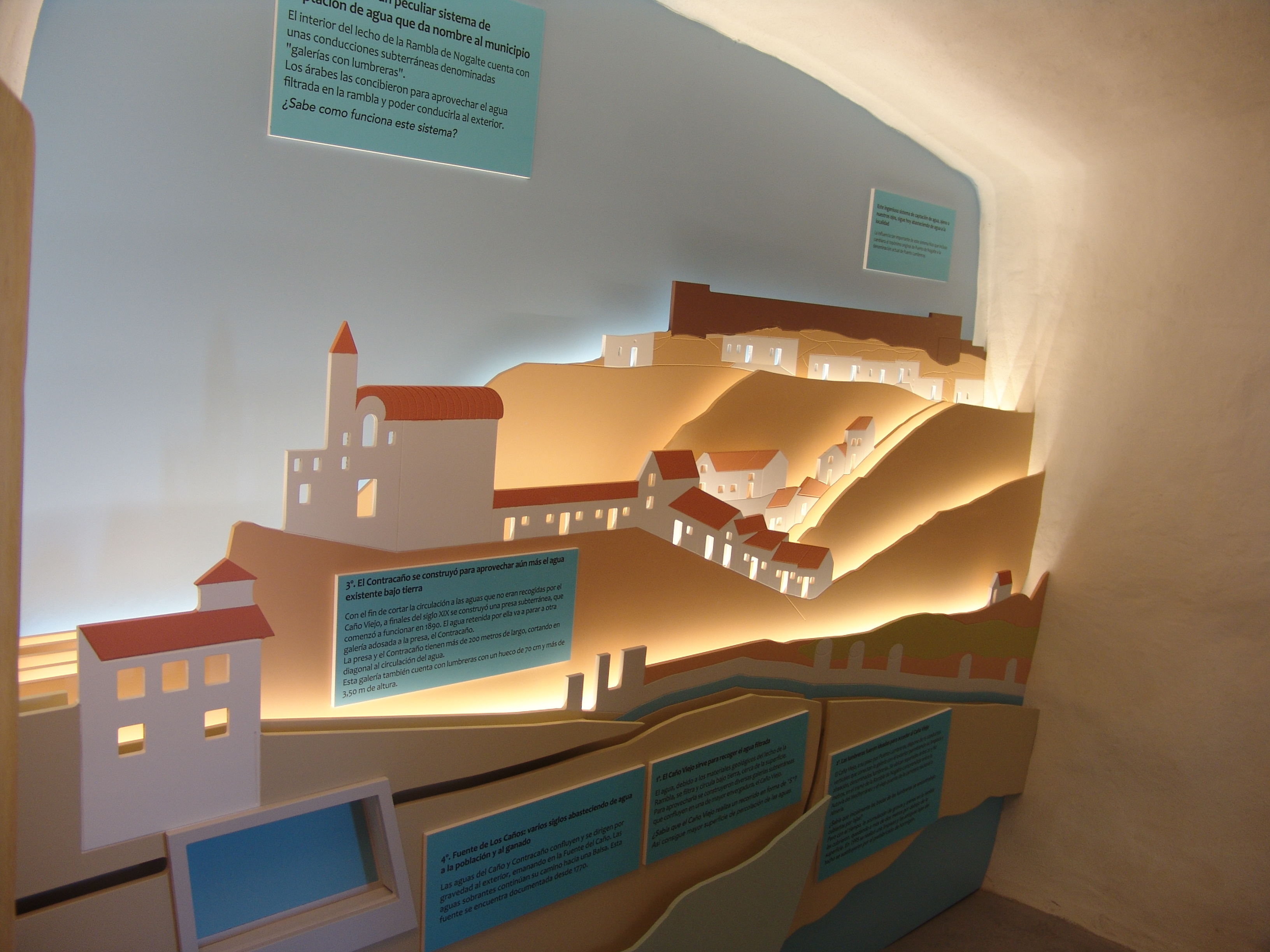 Espacio dedicado a las lumbreras en la cueva "Los Caminos del agua en Puerto Lumbreras"